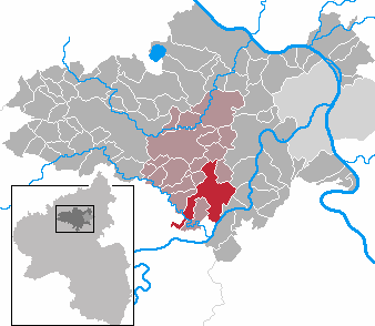 Münstermaifeld in Rhineland-Palatinate - district Mayen-Koblenz